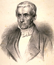 26. Giuseppe Gazzeri, 18 marzo 1801 : ritratto : litografia realizzata da L. Fiorucci (graf. stamp., 1 c., b/n, 23x17 cm, [1842?])